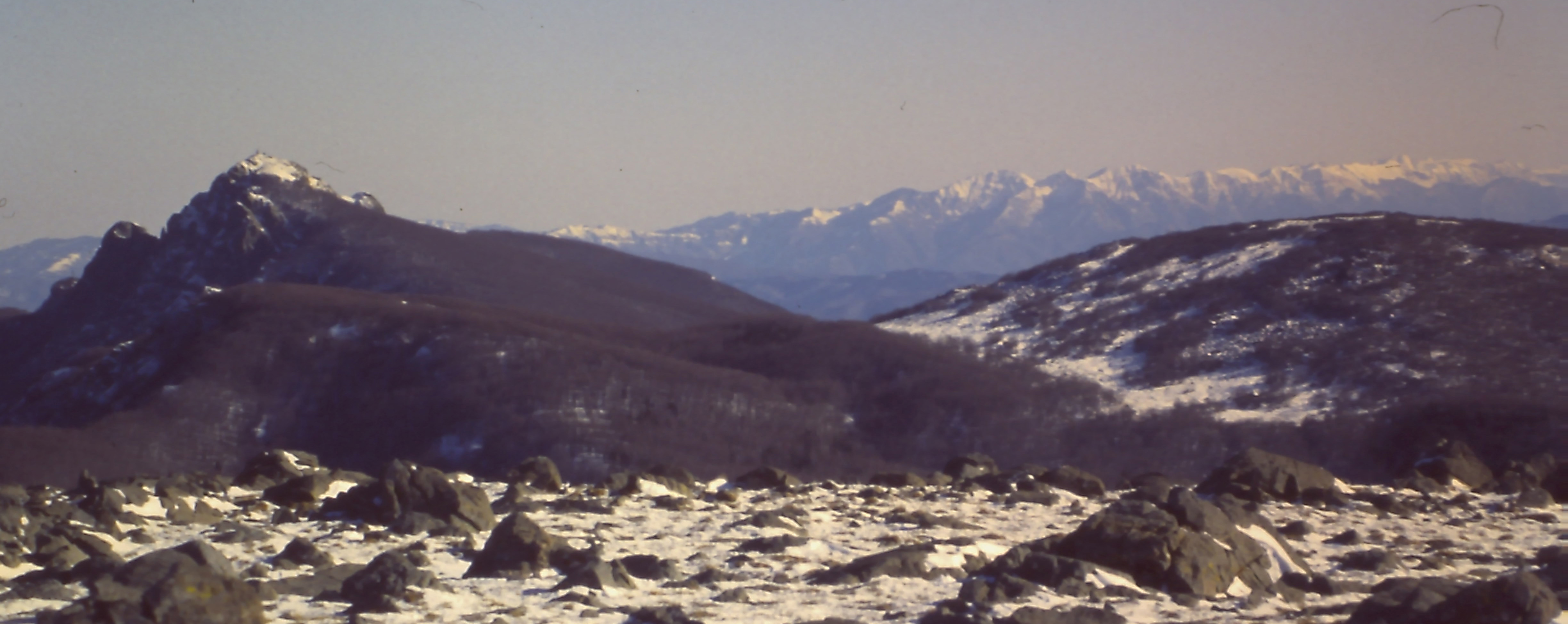 Il Monte Penna (1.735 m.) innevato ripreso dalla vetta dell'Aiona; alla sinistra il M.Pennino. A destra, sullo sfondo, le Alpi Apuane.